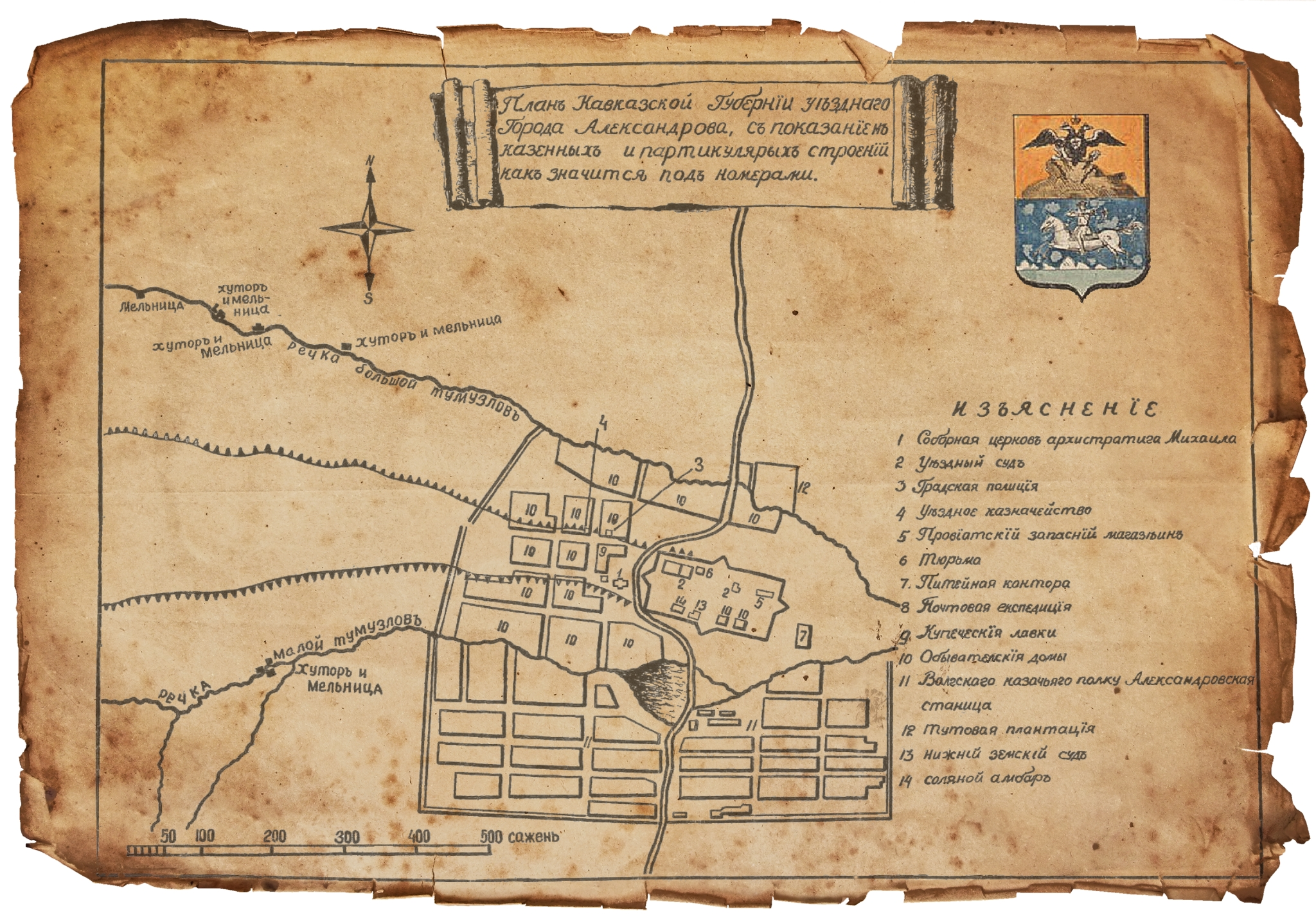 план-схема г.Александров Кавказской губернии